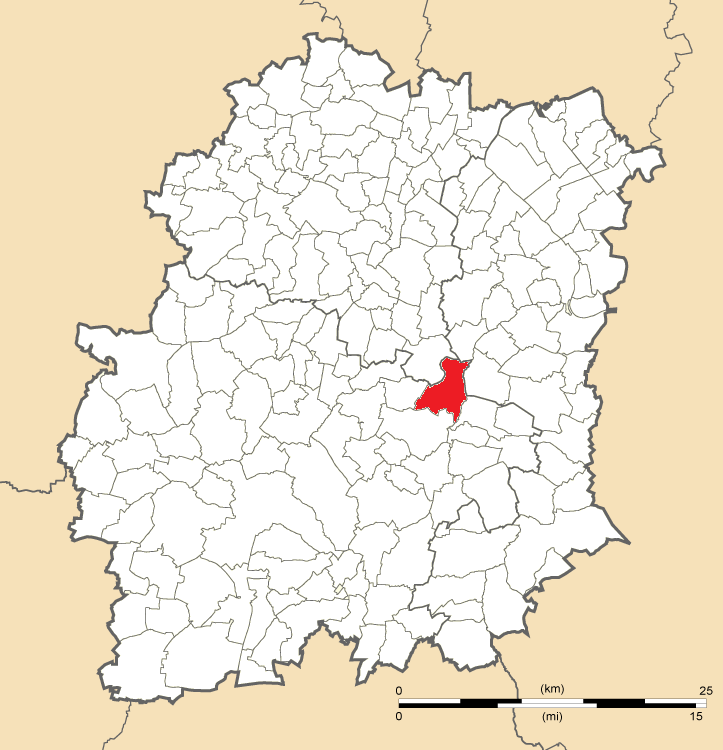 Carte de position d'Itteville en Essonne (91)